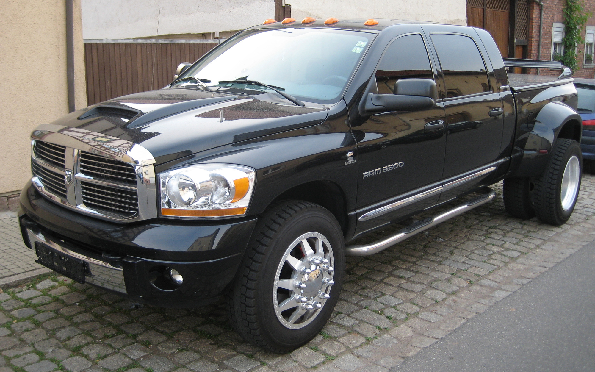 2006er Dodge Ram 3500 Mega Cab Dually 4x4 Heavy Duty Pickup Truck in der Ausstattungsvariante “Laramie”